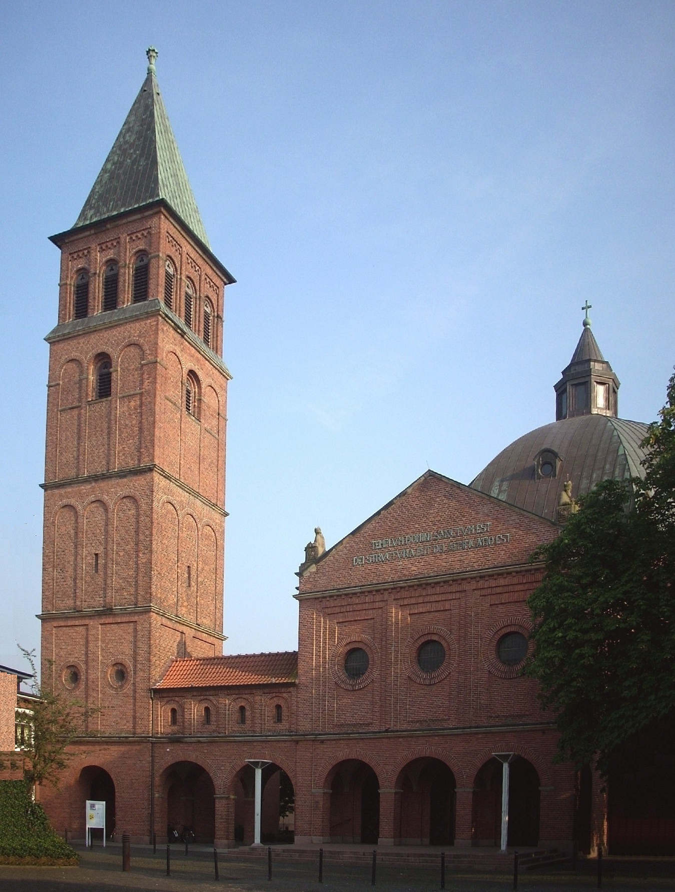 Kath. Kirche St. Augustinus Nordhorn